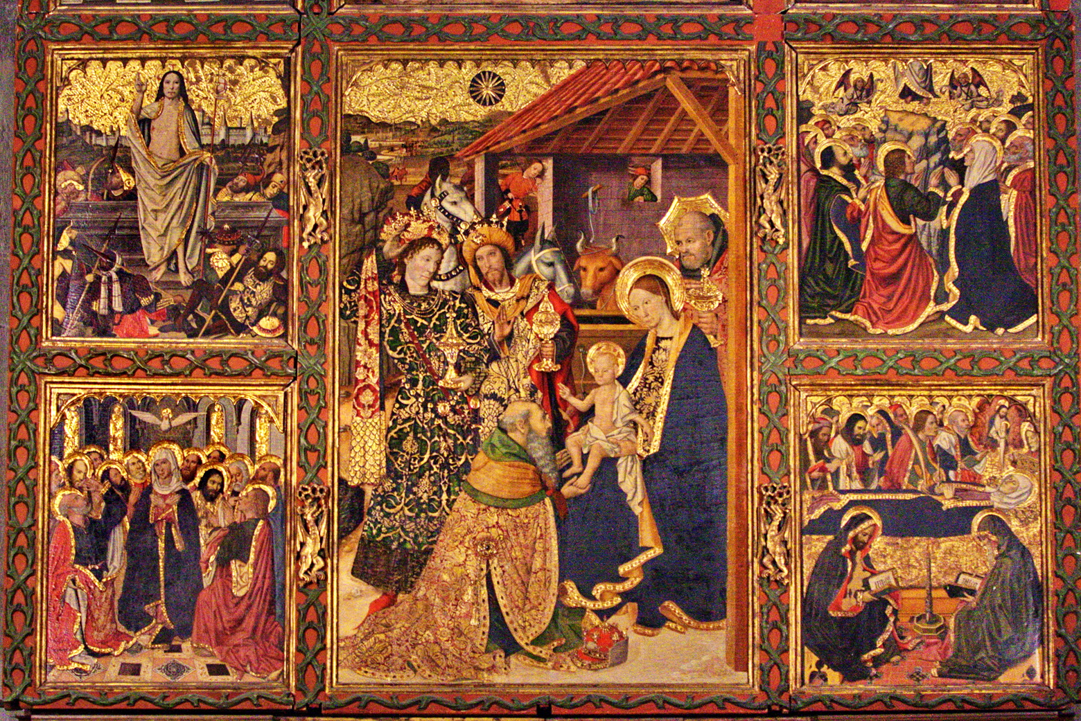 Capella Reial de Santa Àgata (Barcelona). Retaule del Conestable, obra de Jaume Huguet (1464-1465). Tremp sobre taula (673 x 368 cm)